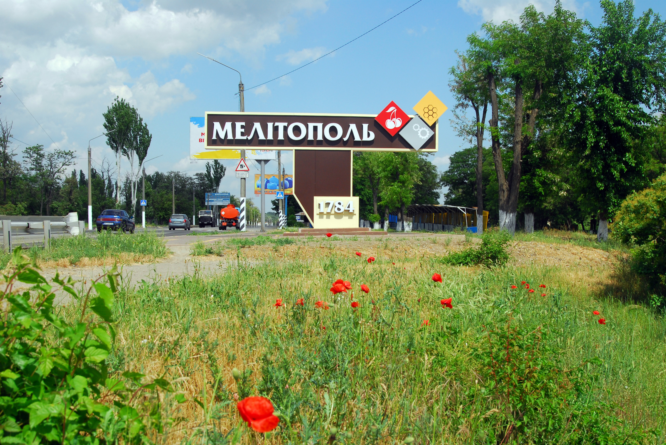 Трасса. Мелитополь